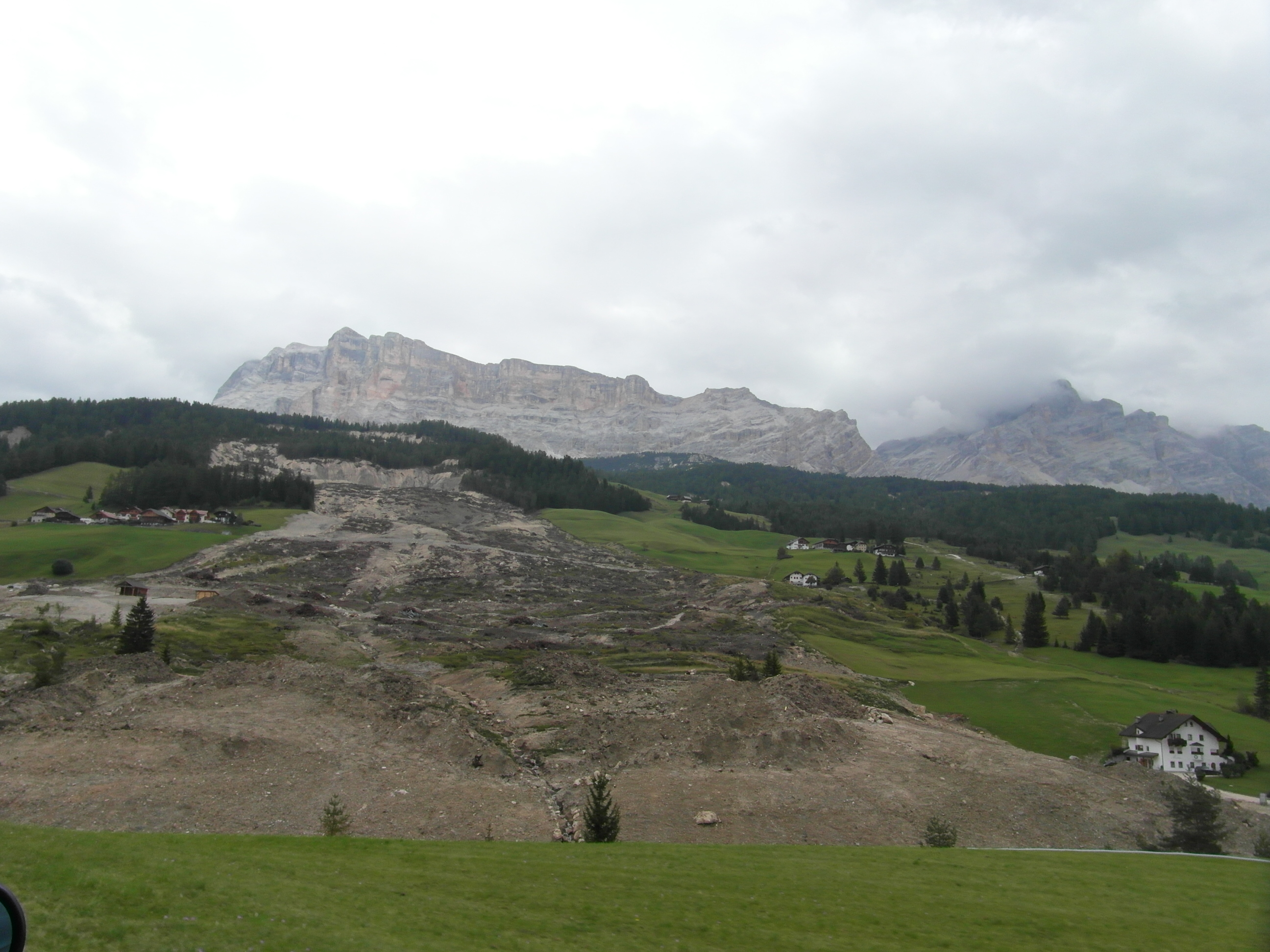 Ansicht im September 2013 des Geländes im Südtiroler Gadertal, das sich im Dezember 2012 bei einem großen Erdrutsch Richtung Gader bewegte und dabei mehrere Häuser zerstörte